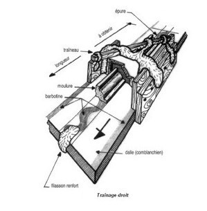 afin d'obtenir une moulure traînée par exemple.